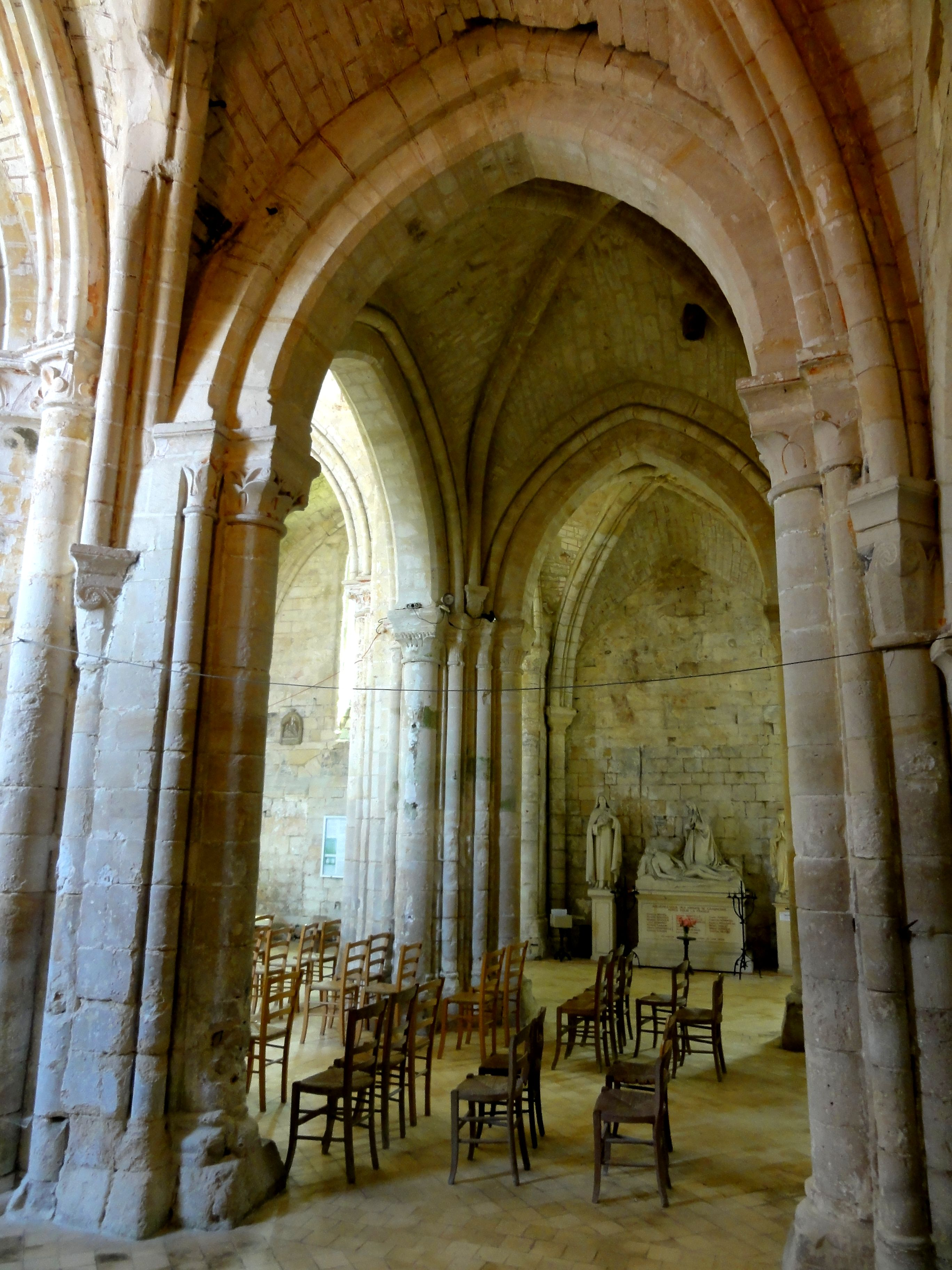 Transept, vue nord-sud.